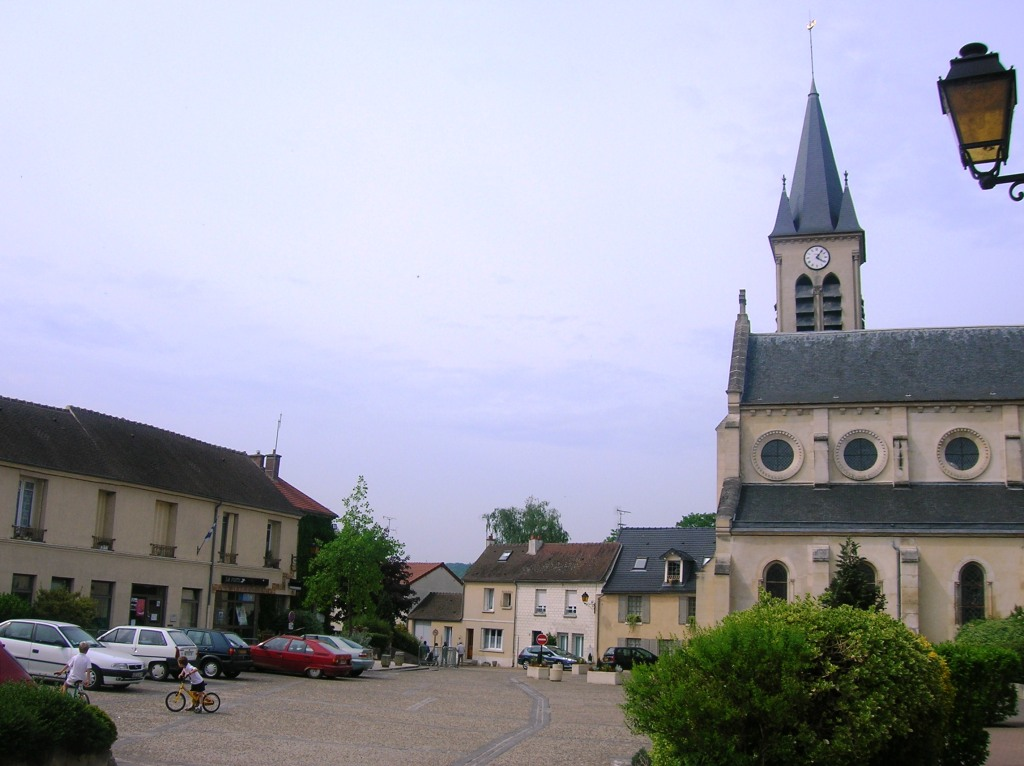 Place de Coye la Foret